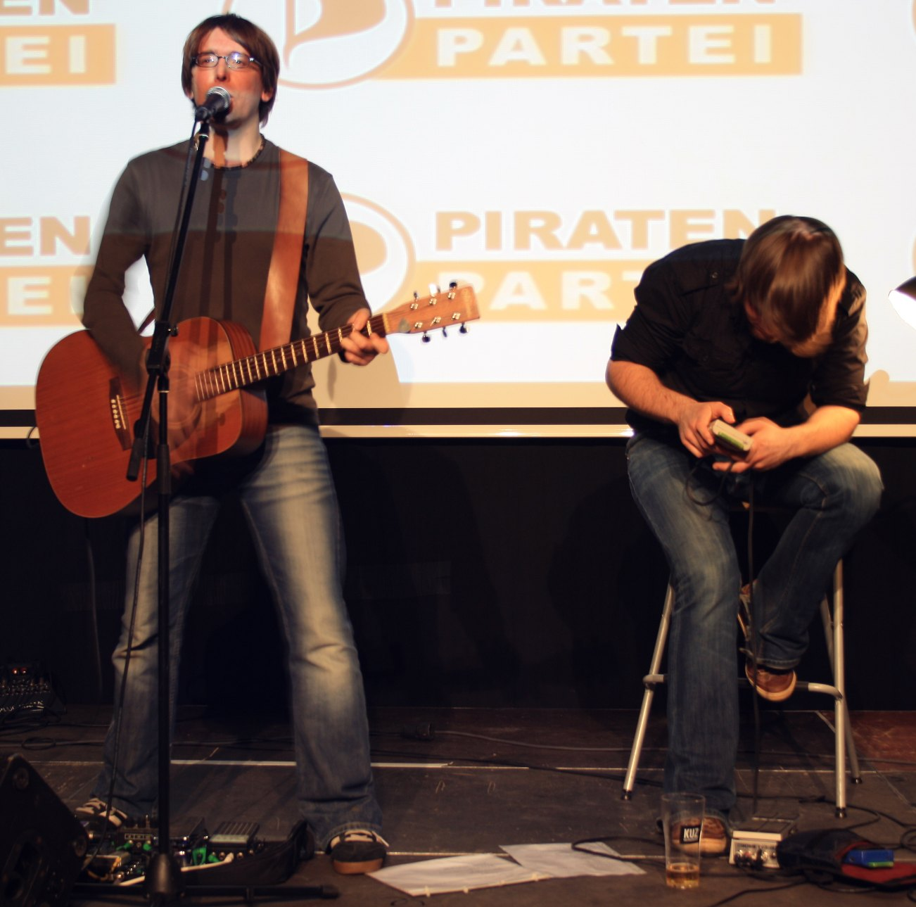 Pornophonique auf der Wahlparty der Piraten in Mainz